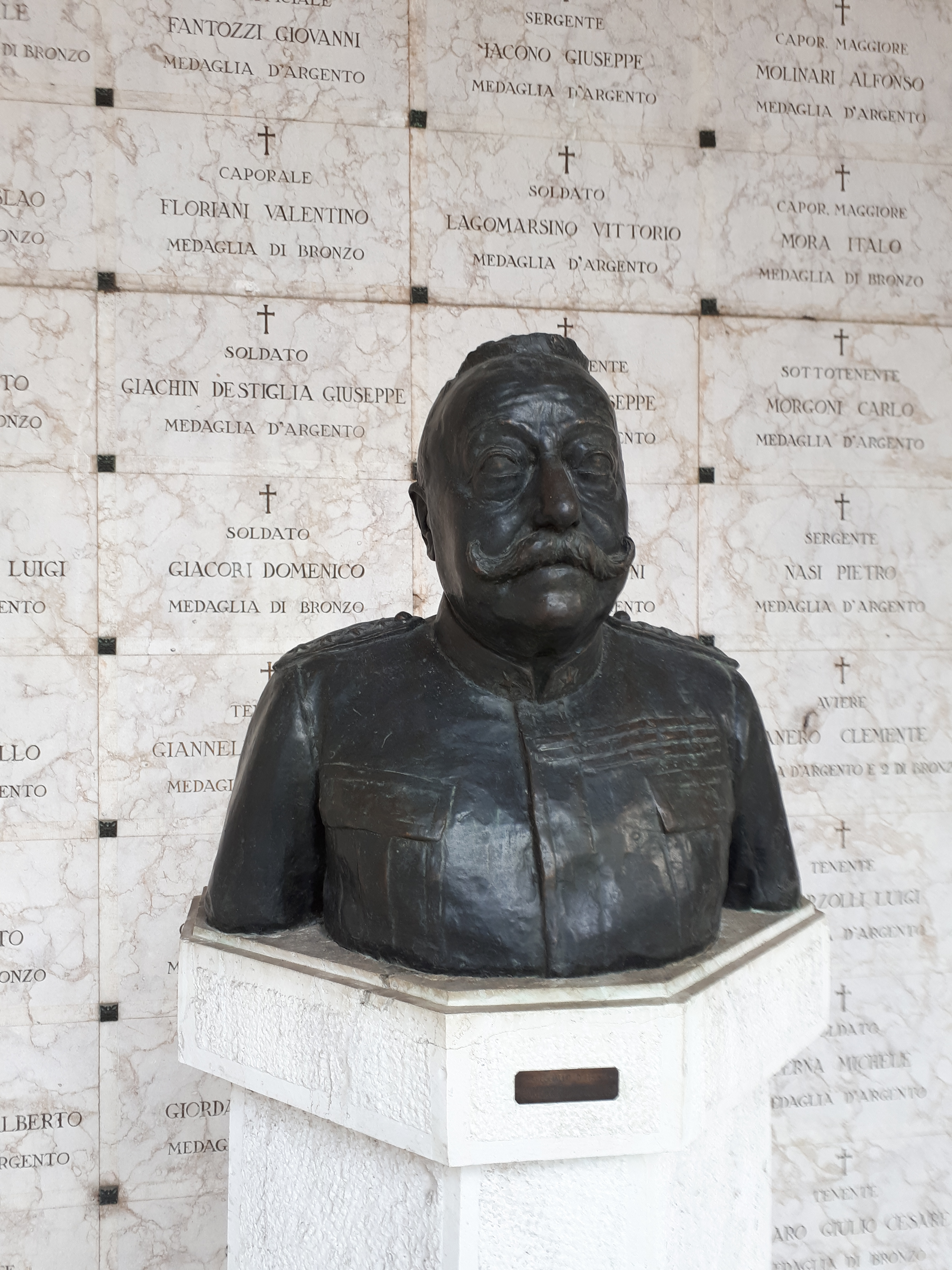 Alimondo Ciampi, busto di Guglielmo Pecori Giraldi